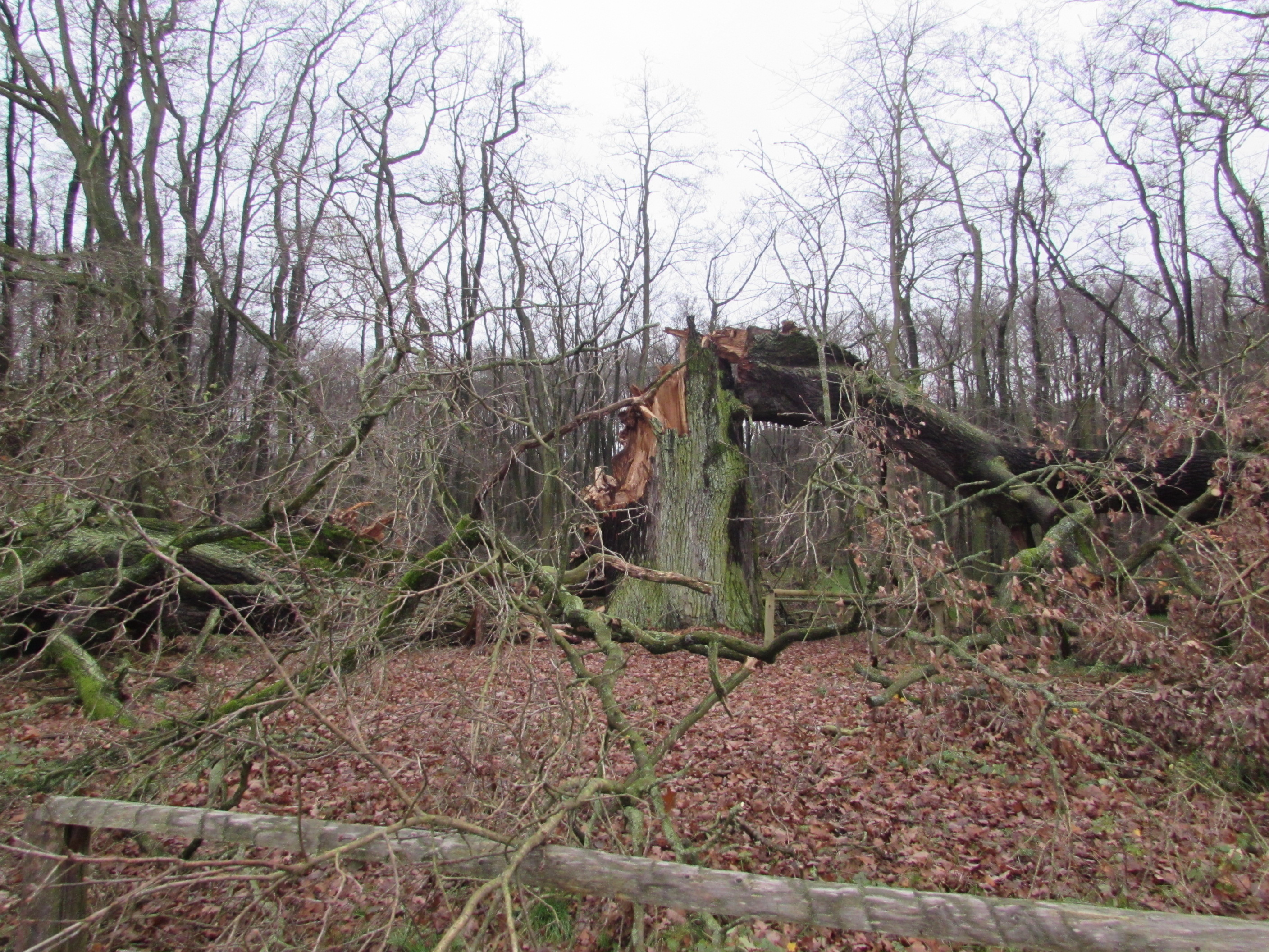 Die Bohnenländer Eiche nach ihrer Zerstörung im Sturm.